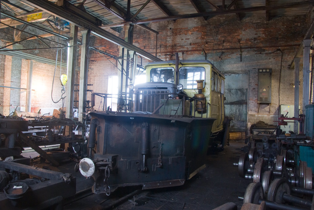 ESU-904//ЭСУ-904 с отвалом.